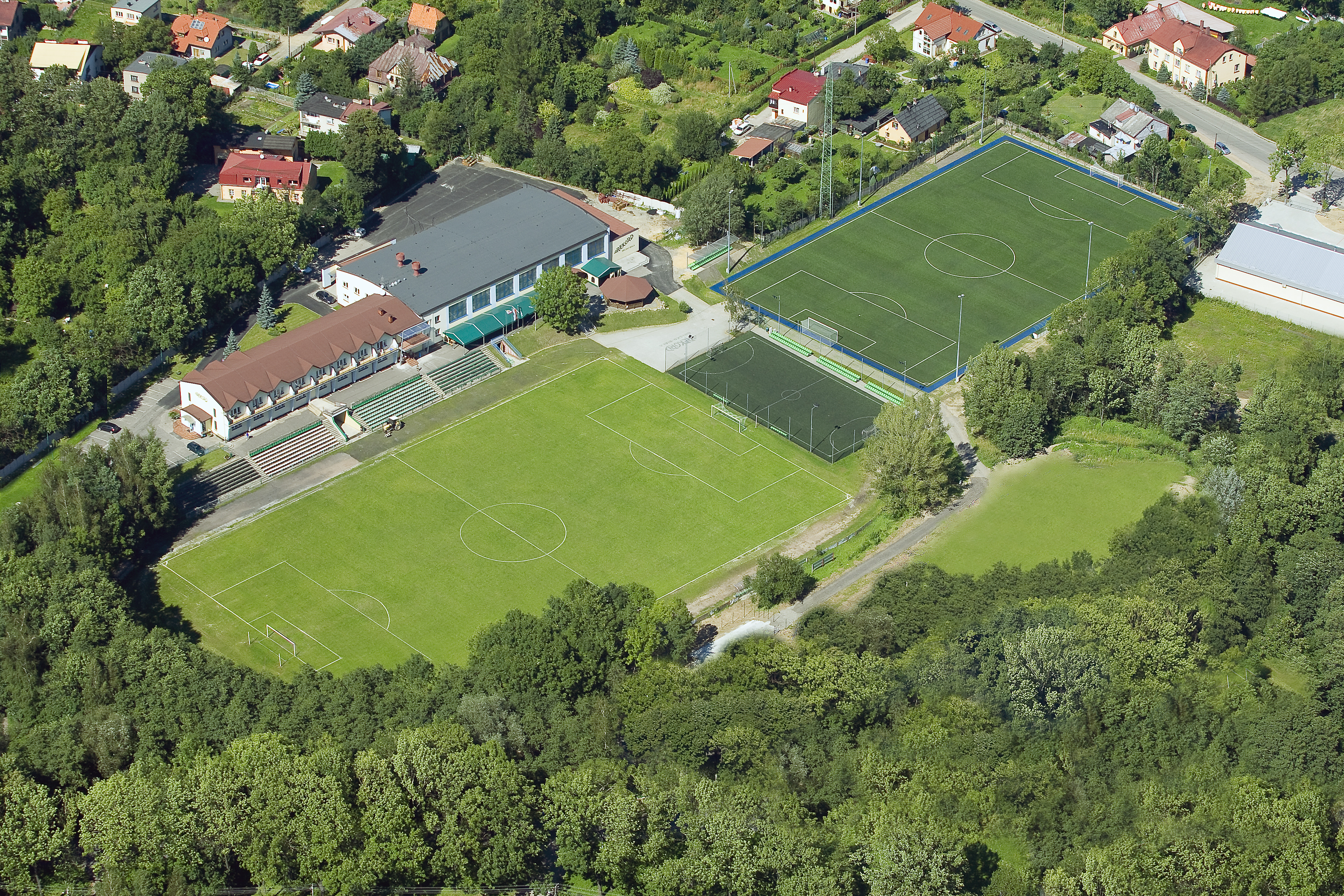 Panorama klubu BTS Record Bielsko-Biała